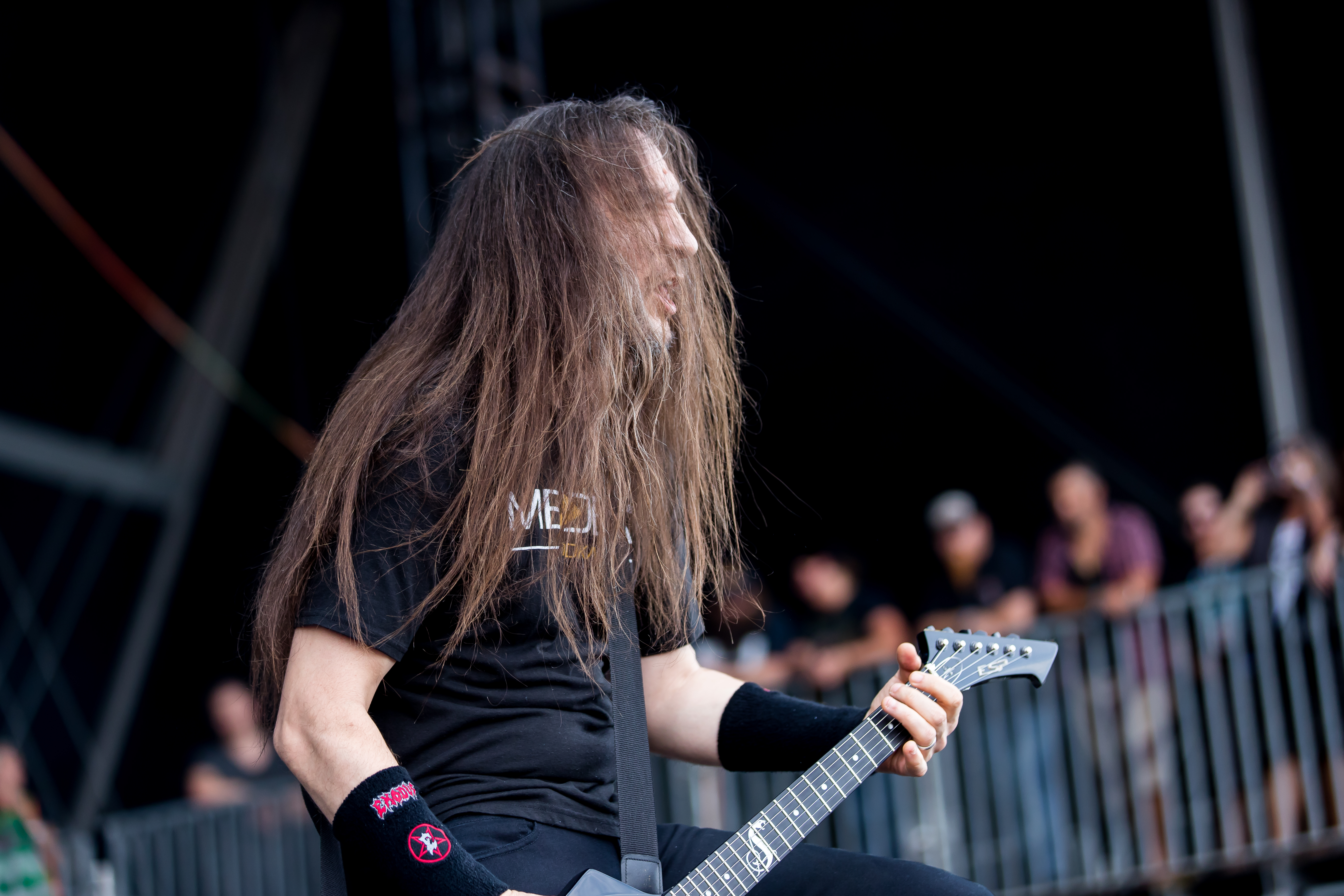 Exodus during Summer Breeze 2016 at , Dinkelsbühl, Bayern, Germany on 2016-08-18, Photo: Sven Mandel